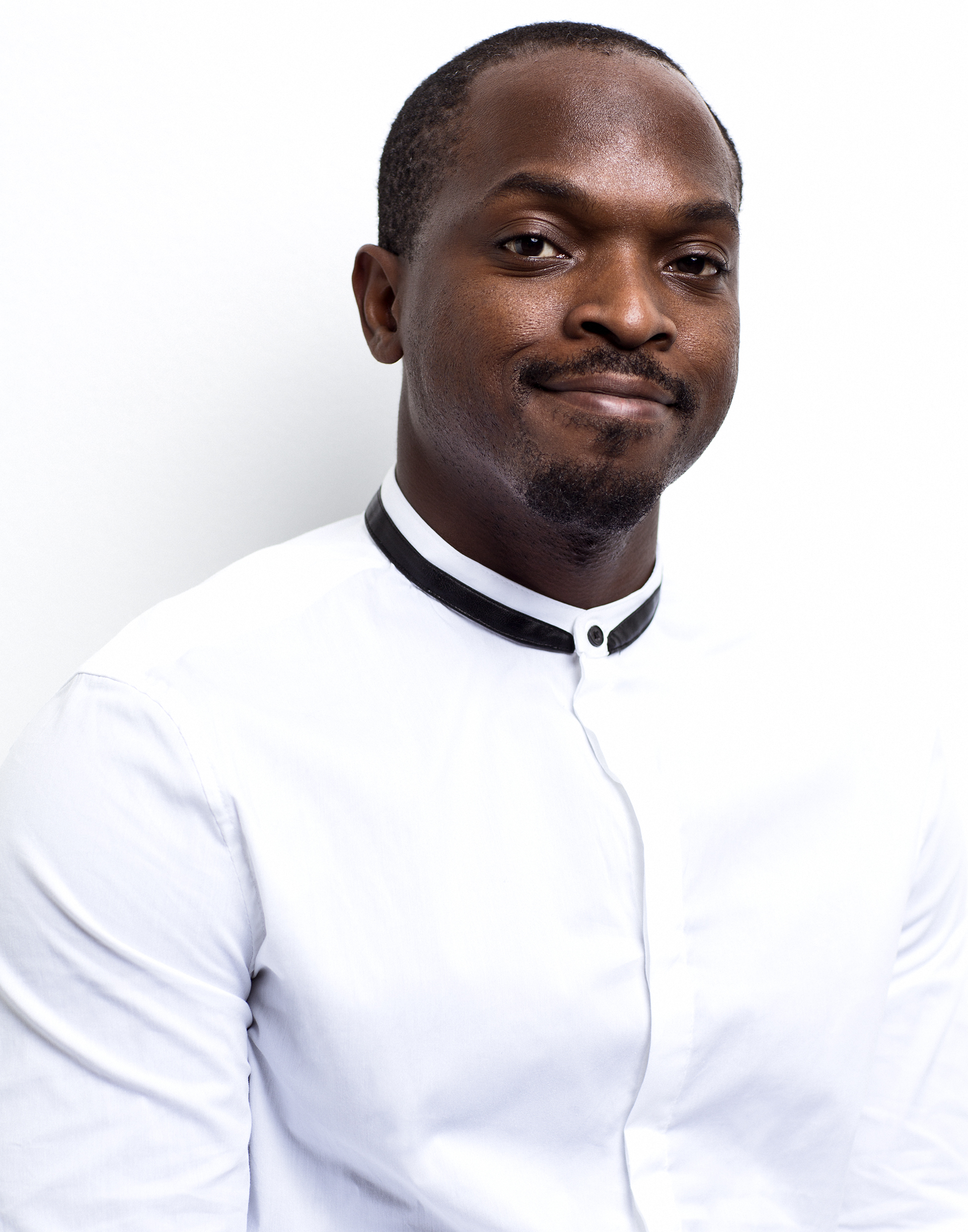 Pressbild på Kodjo Akolor.